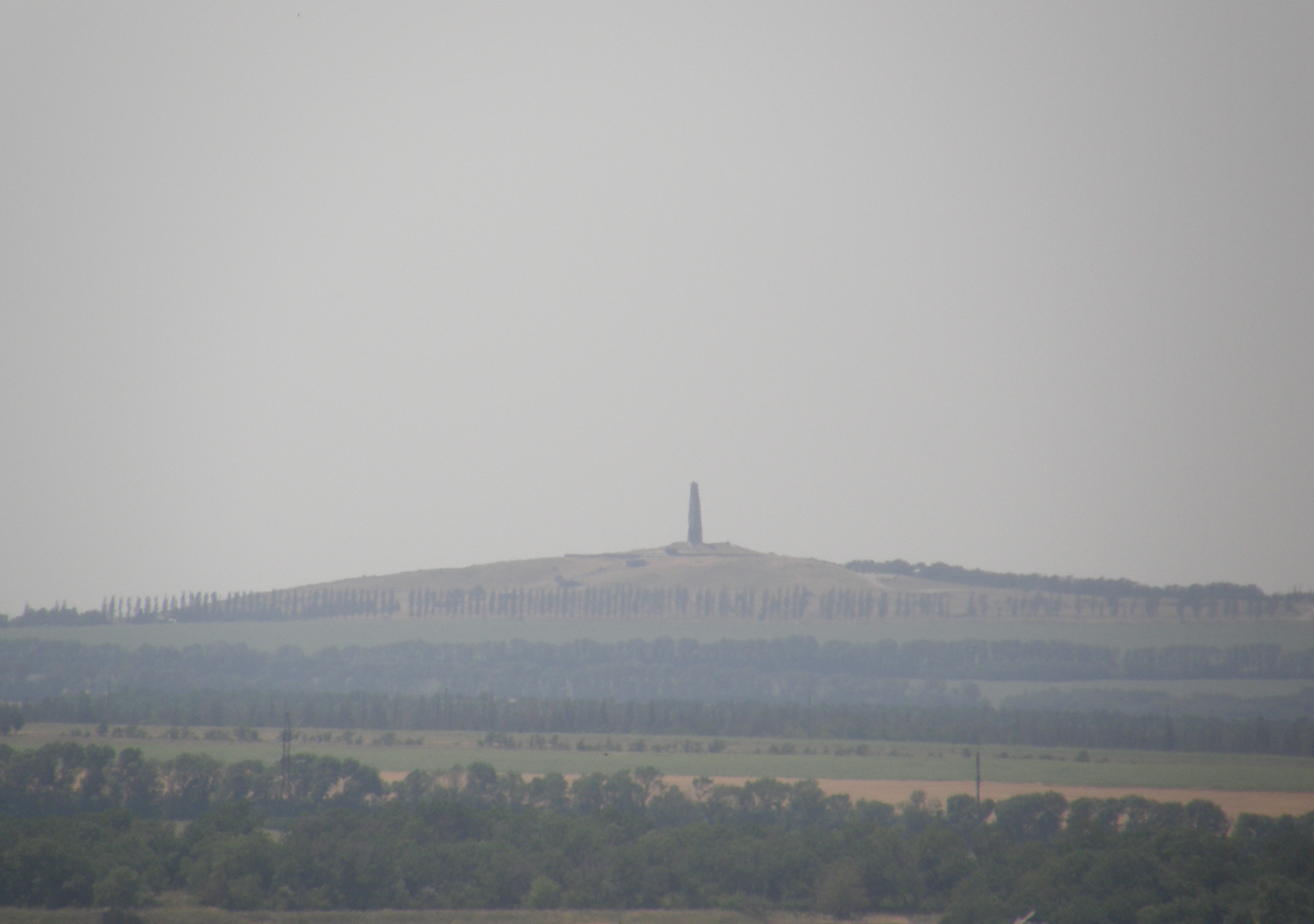 Снежное